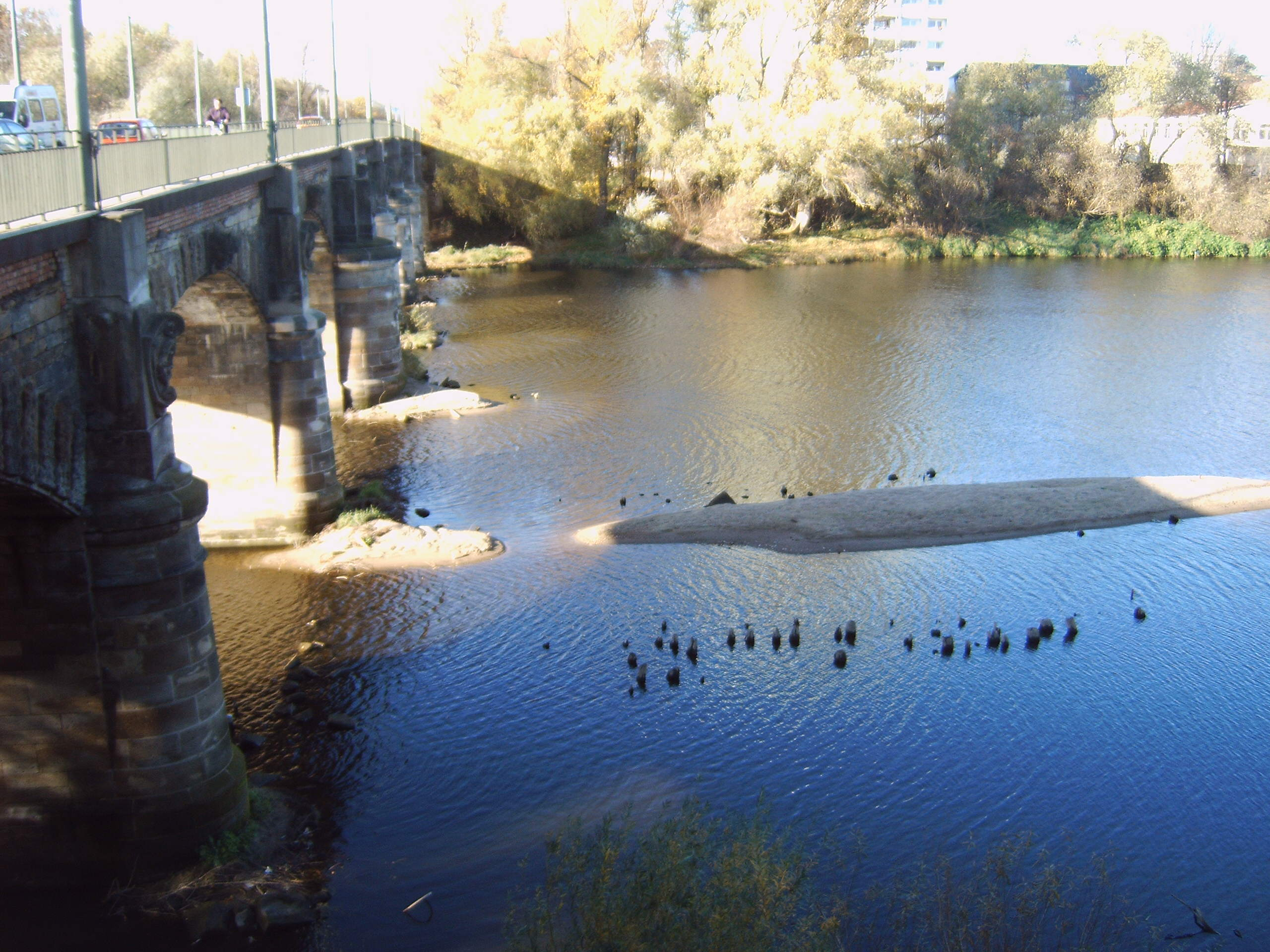 Pfähle der Langen Brücke in der Alten Elbe, nördlich der Anna-Ebert-Brücke, Saxony-Anhalt, Germany